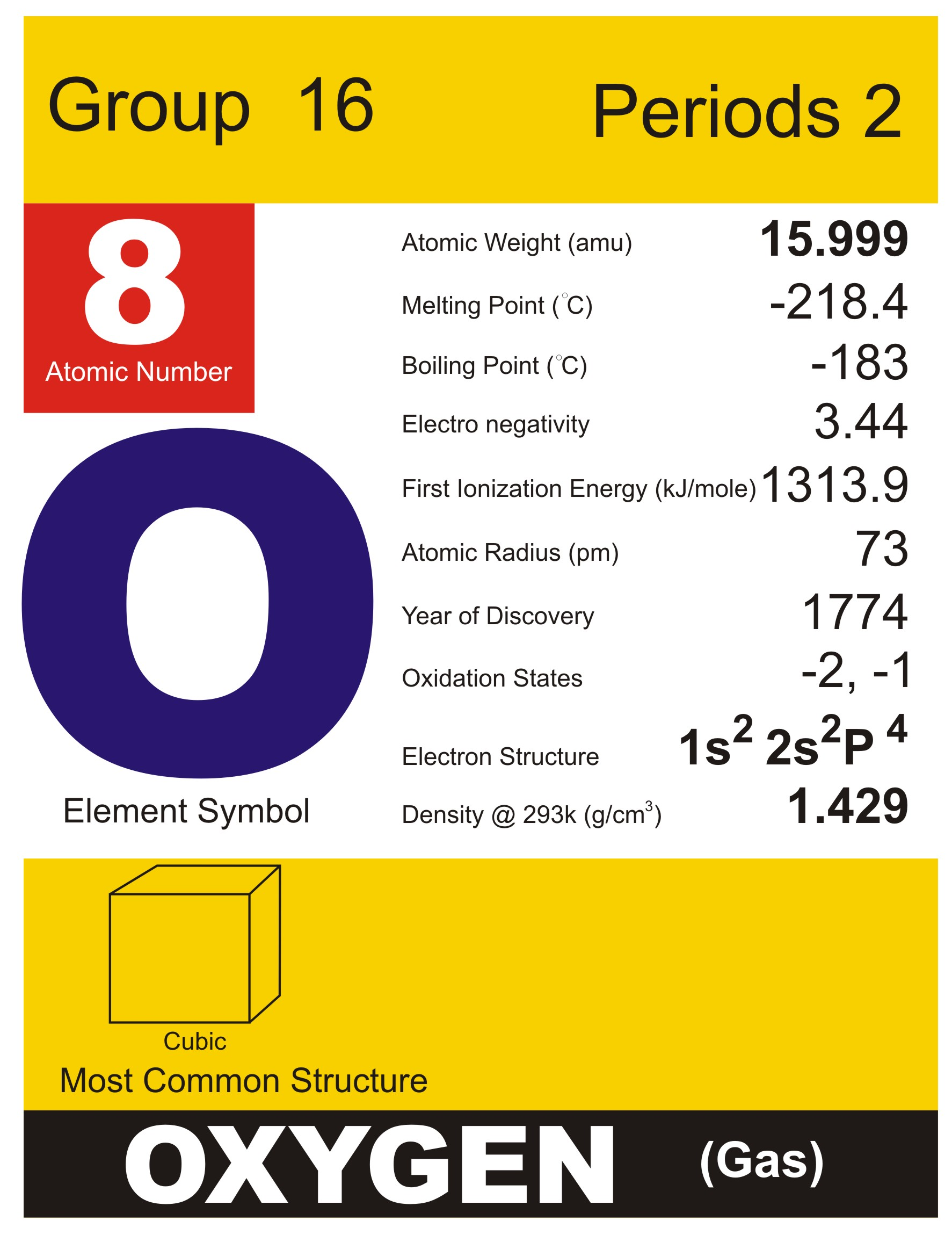 ഓക്സിജൻ